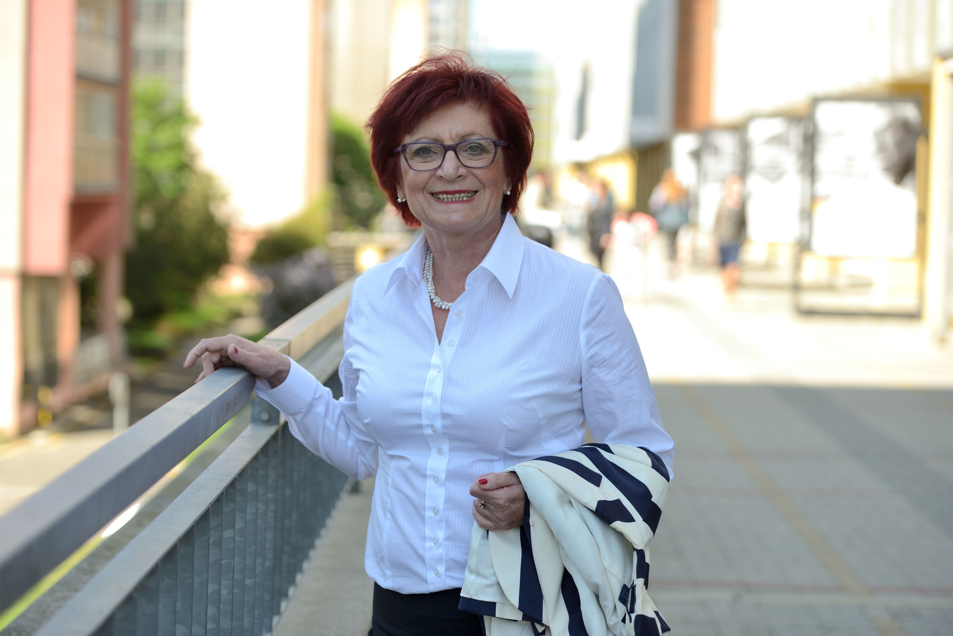 Eva Kislingerová, Městská část Praha 10